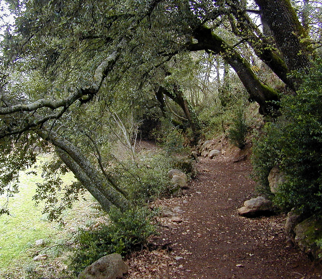 Camí de la Baixa Ribagorça, a la Vall de l'Isàvena, que puja a la Serra de Sis.